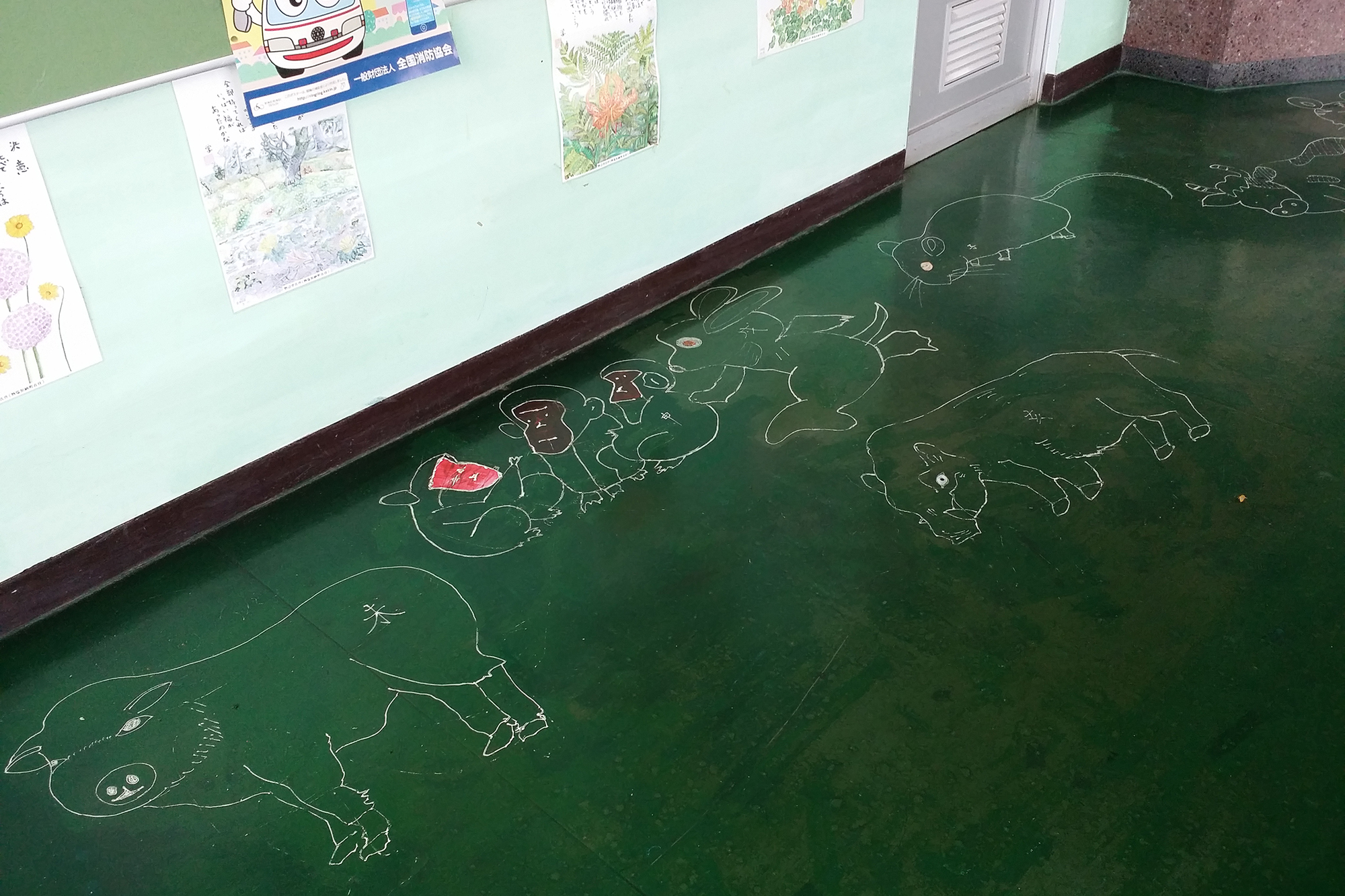 駅舎内の床に描かれたイラスト